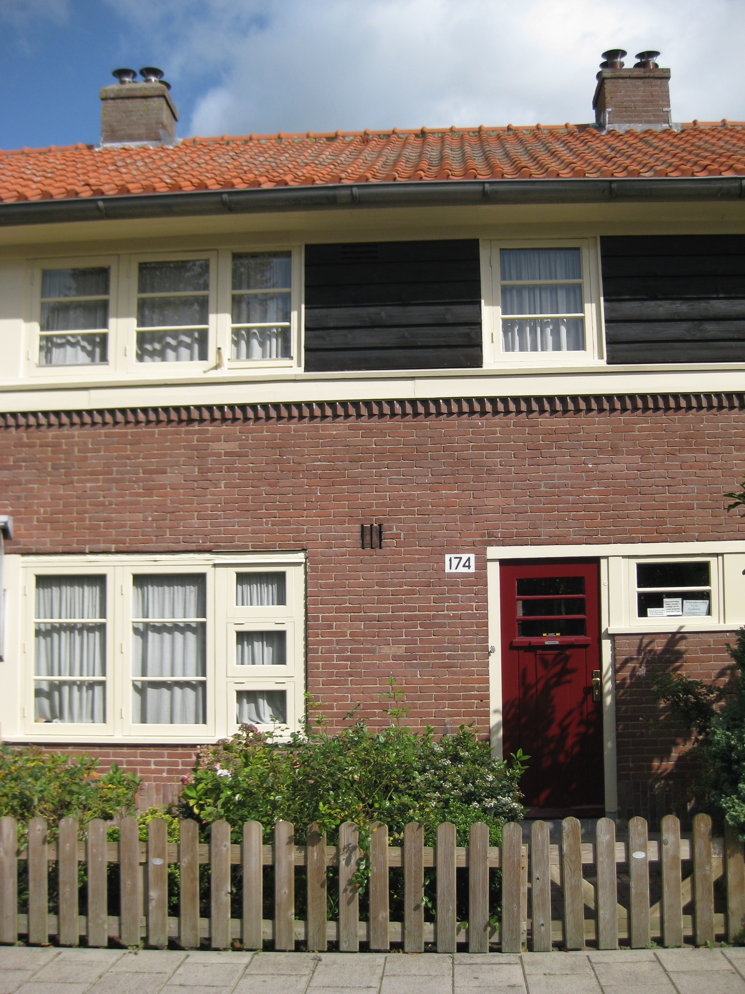 Museumwoning van de Stichting Historisch Archief Tuindorp Oostzaan aan de Meteorenweg 174, Tuindorp Oostzaan in Amsterdam-Noord